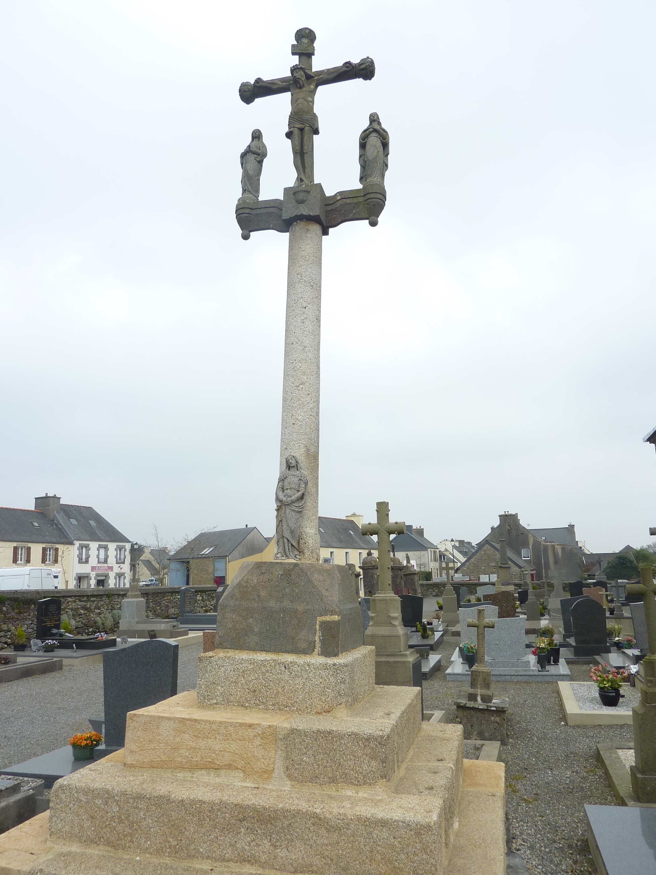 Ploudiry, le calvaire du cimetière